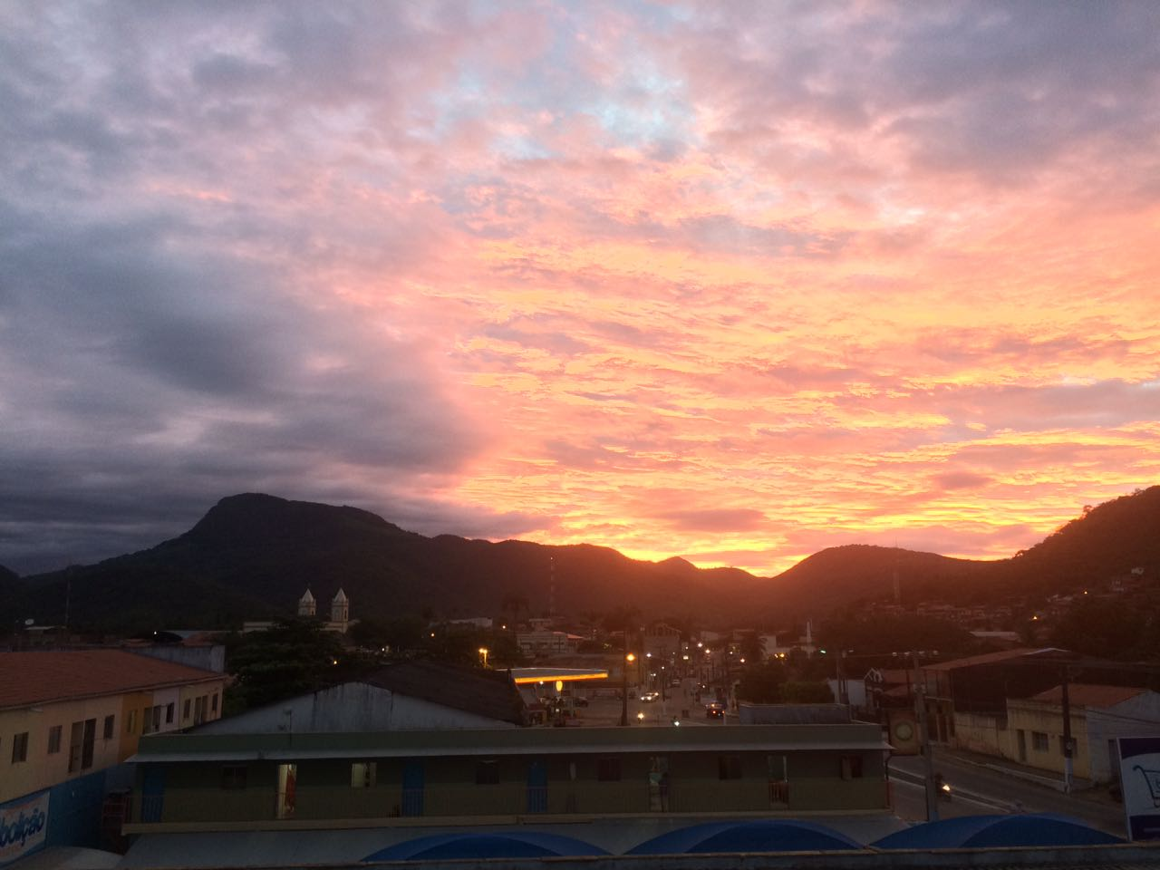 Por do Sol em Redenção-Ce